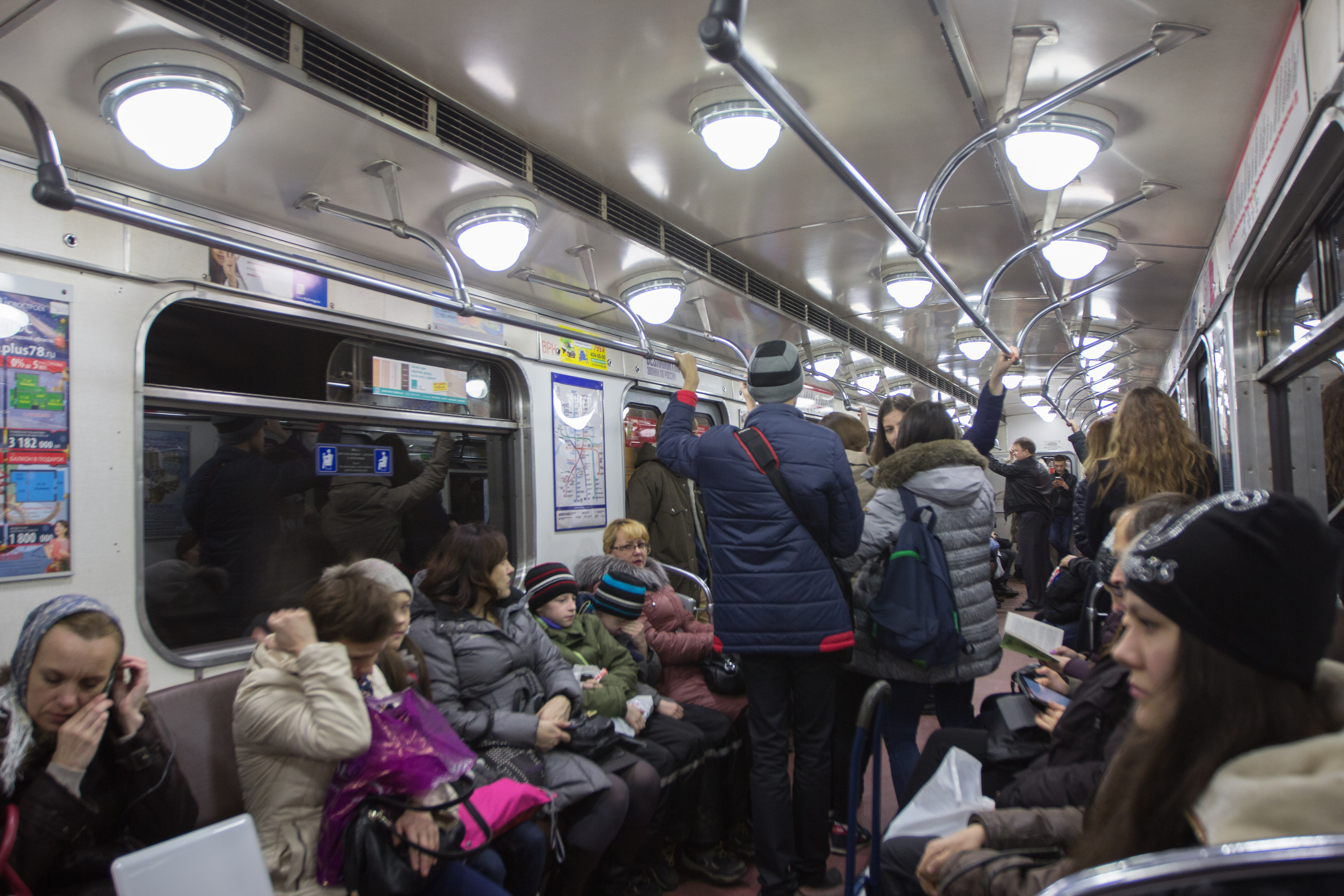 Vue de la station de métro Technologichesky (Lignes 1 et 2) du métro de Saint-Pétersbourg (Russie)